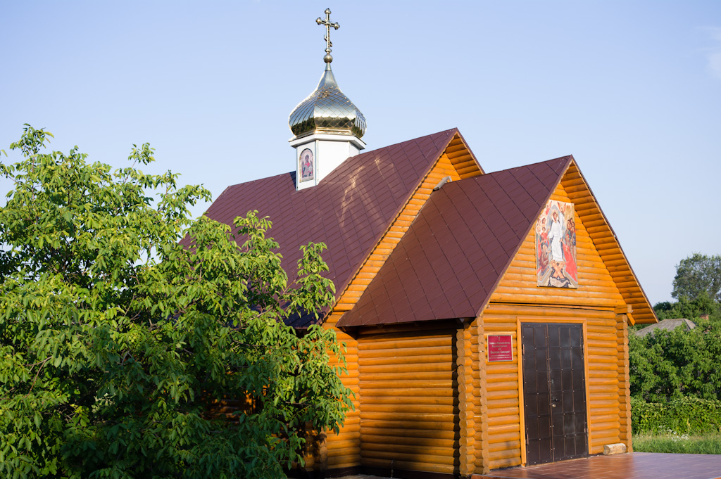 Храм Воскресения Словущего на Байковом кладбище, Киев